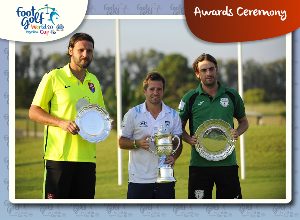 WC 2016 Winners